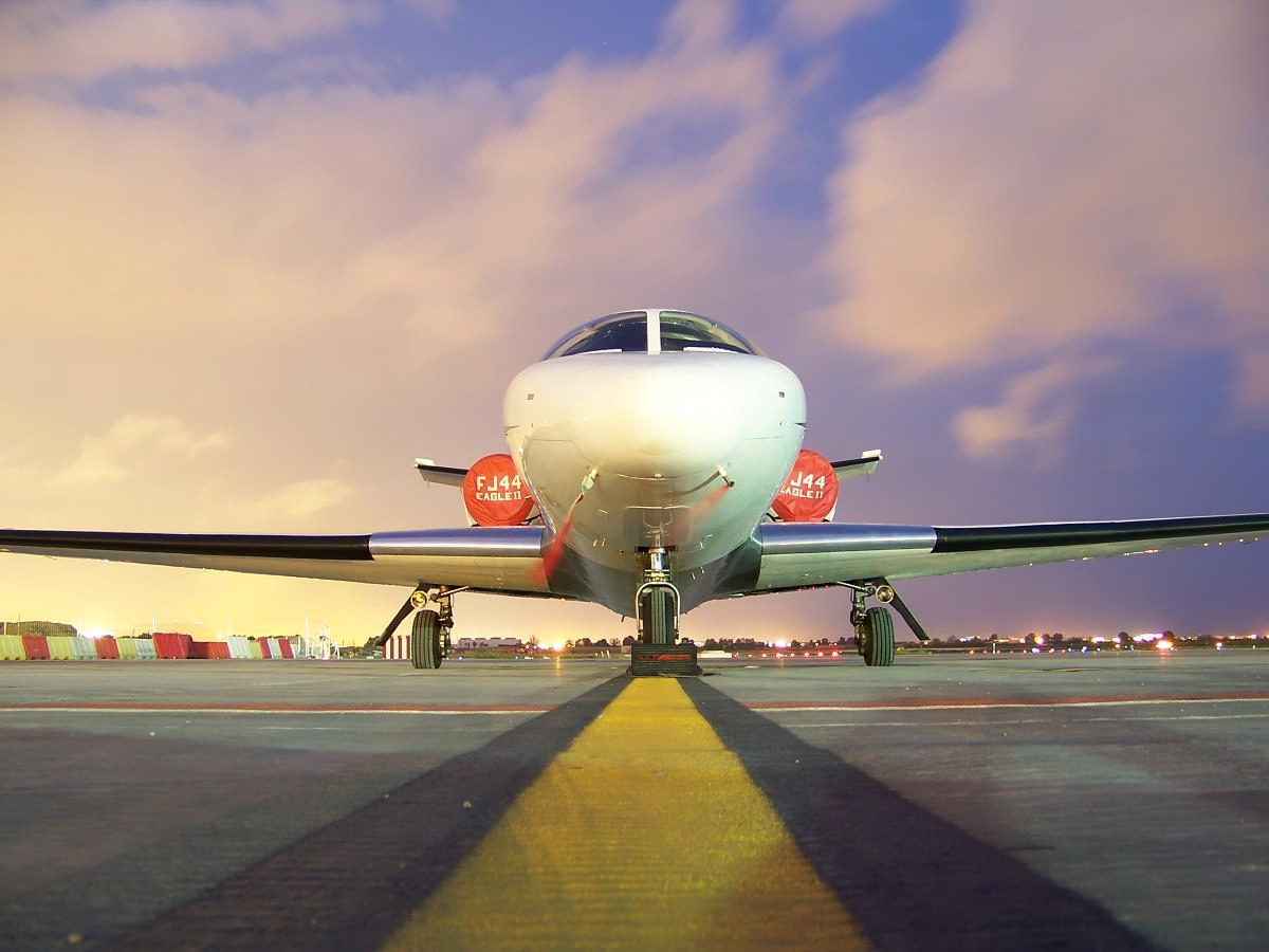 Un privado en exposición larga a las 20:00 Cessna 501 Citation ISP cn 501-0238 BCN / LEBL 2006 OCtubre 11